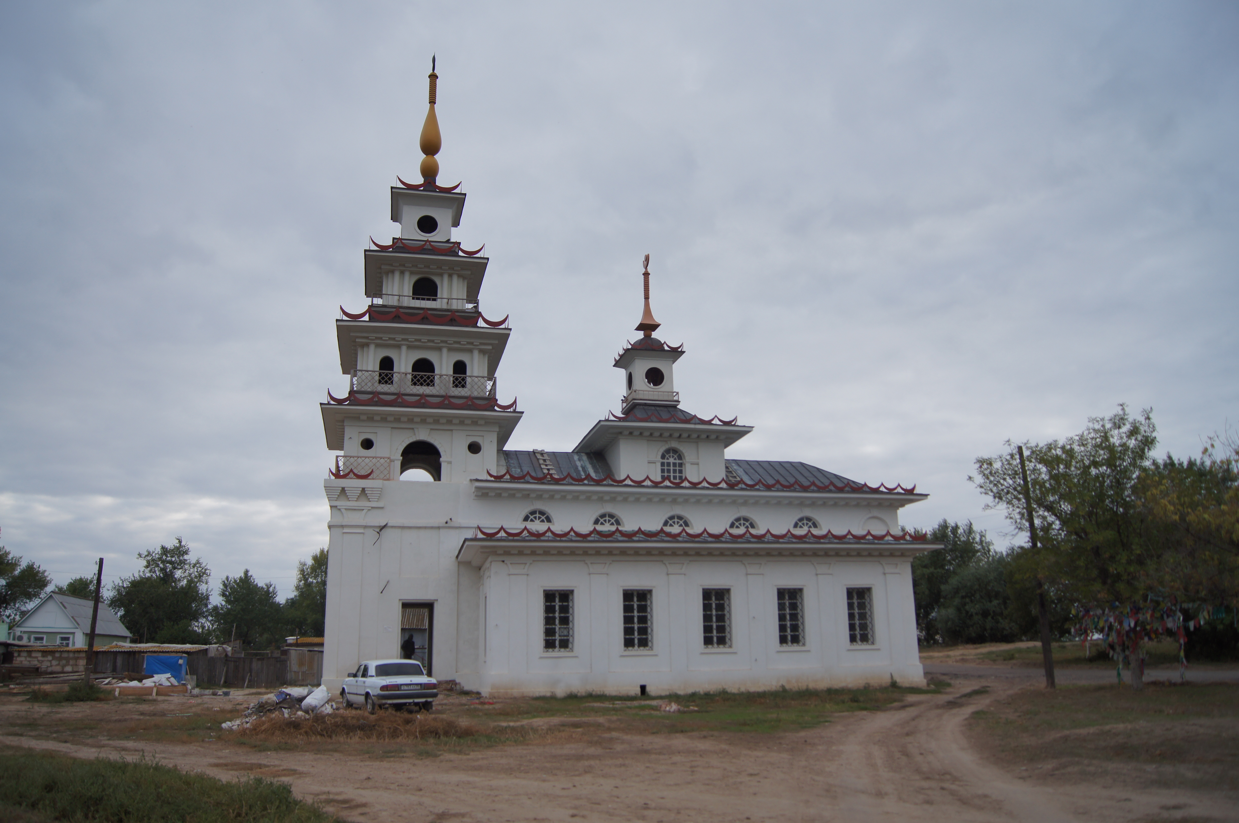 Калмыцкий хурул (хошеутовский) (Астраханская область, Нариманов, село речное)